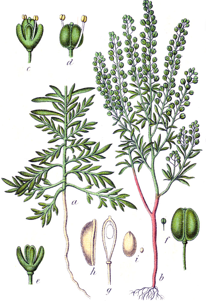 Lepidium ruderale L., syn. Crucifera ruderalis (L.) E.H.L.Krause Original Caption Stink-Kresse, Crucifera ruderalis